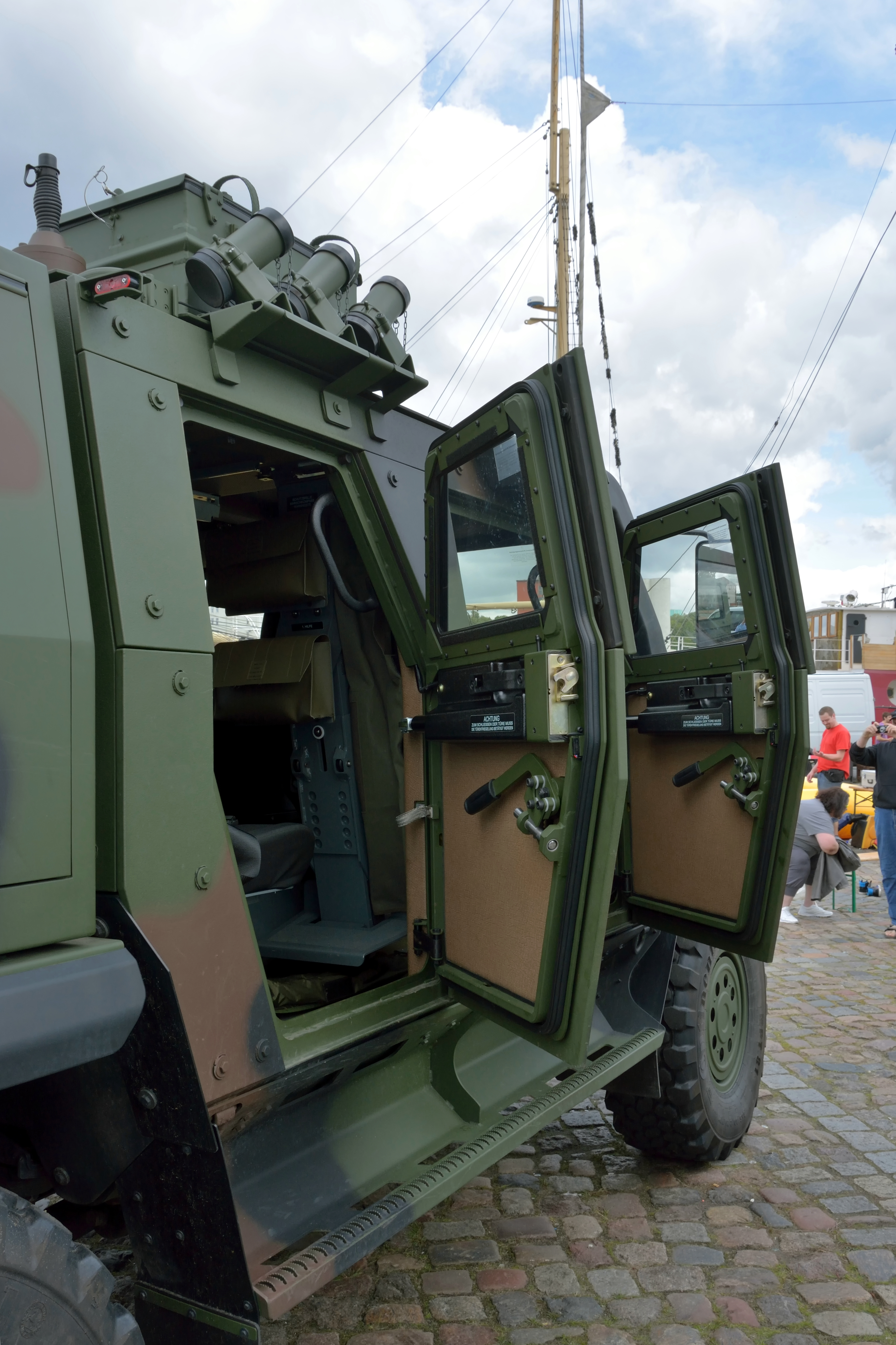 Impressionen der "Sail Flensburg 2016", dies war ein Bürgerfest in Flensburg [1] Das Foto entstand während der Veranstaltung. Impressionen aus dem Treffen in Flensburg Die Panzerung der Seitentüren des Mowag Eagle V ist gut zu erkennen, weniger gut die Dicke der Sitenscheiben.